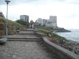 Un bonito paseo costero que honra la memoria de Toribio de Luzuriaga